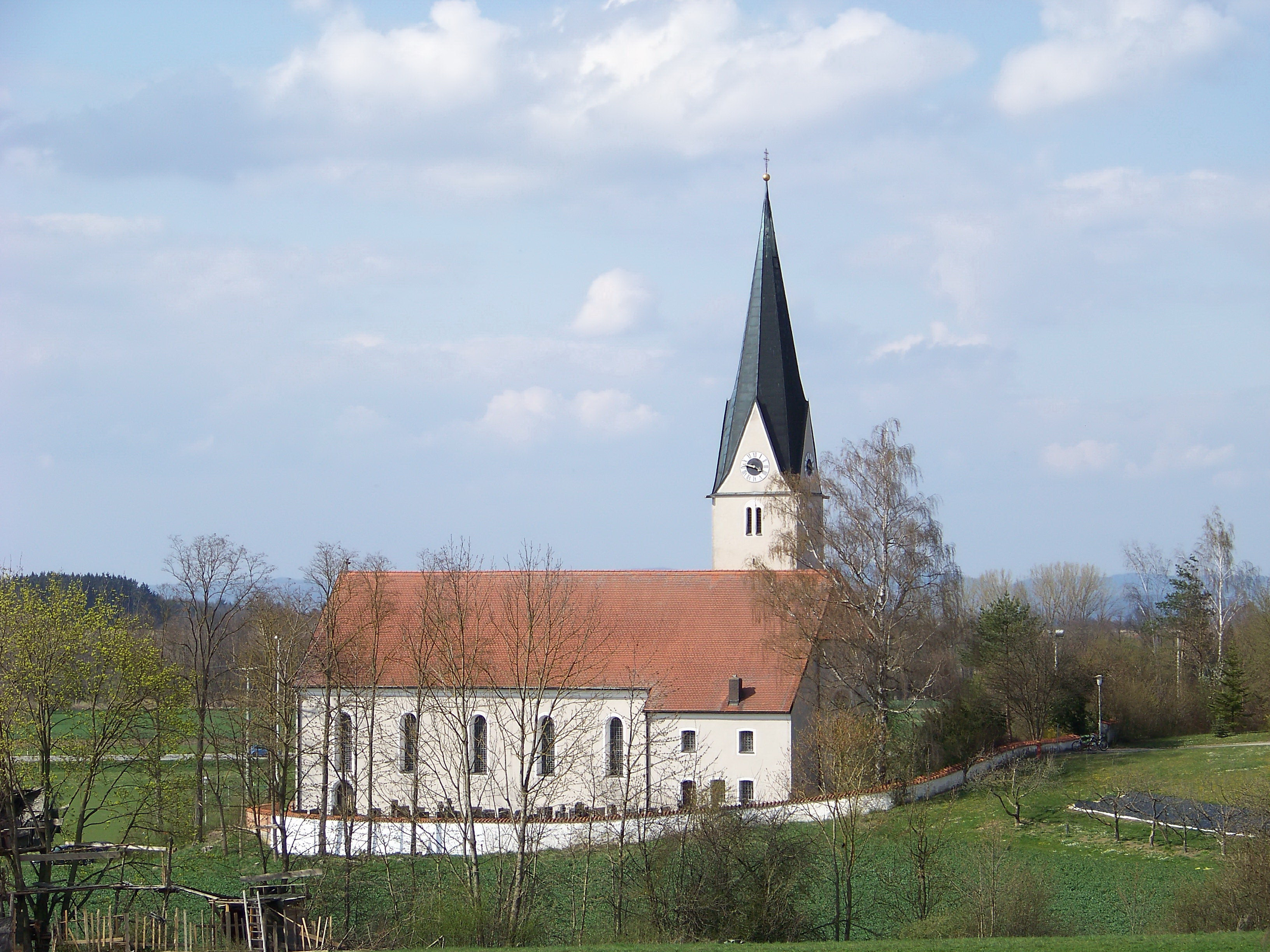 Perkam, Pfarrkirche Mariae Himmelfahrt